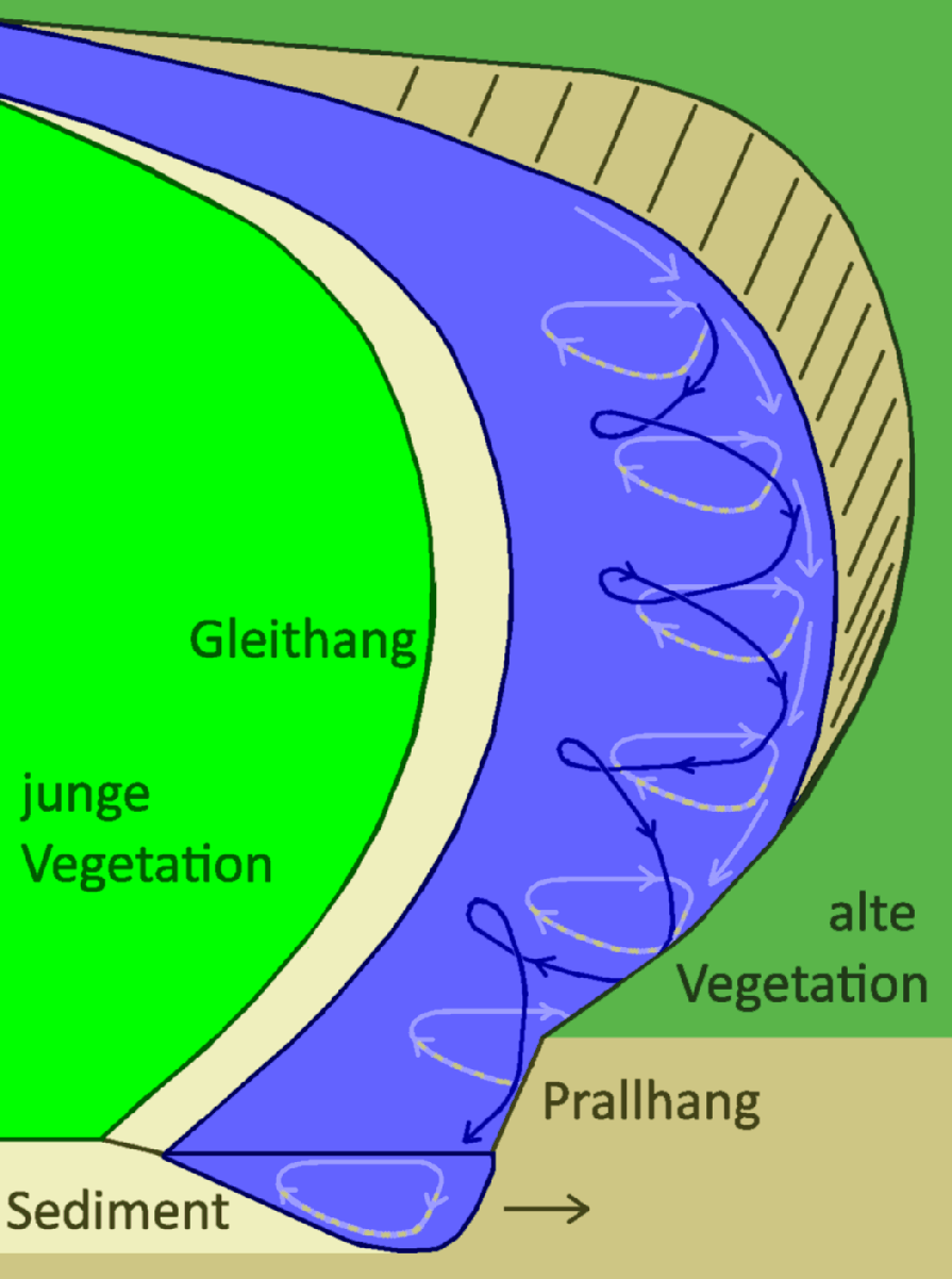 Schematische Darstellung der helicalen Strömung innerhalb einer Flussschleife zur Erklärung von Prallhang und Gleithang.